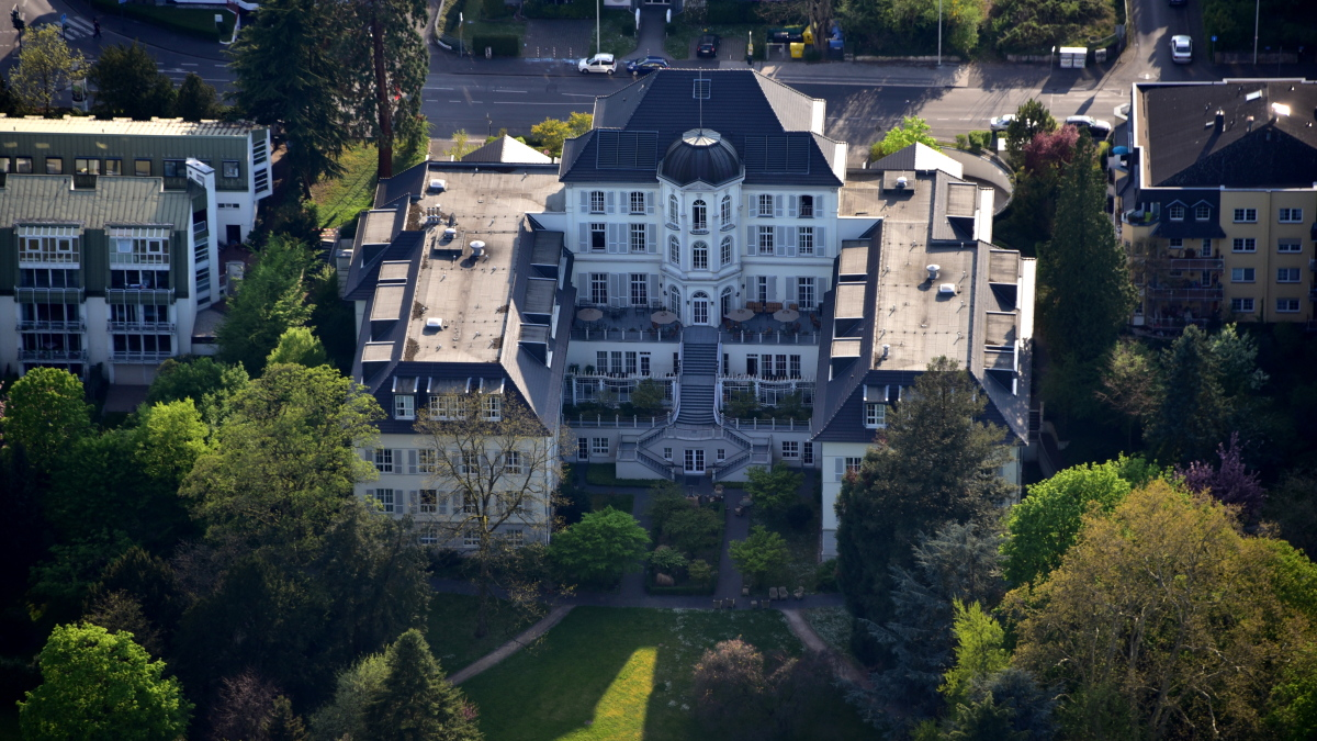 Villa Camphausen, Mainzer Straße 233, Bonn-Mehlem: Luftaufnahme